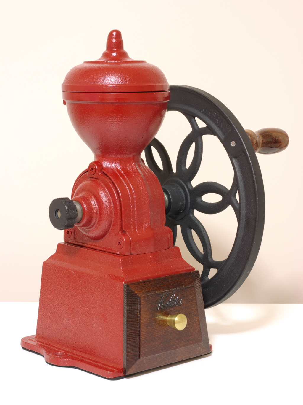 カリタが製造した鋳鉄製手動式コーヒーミル